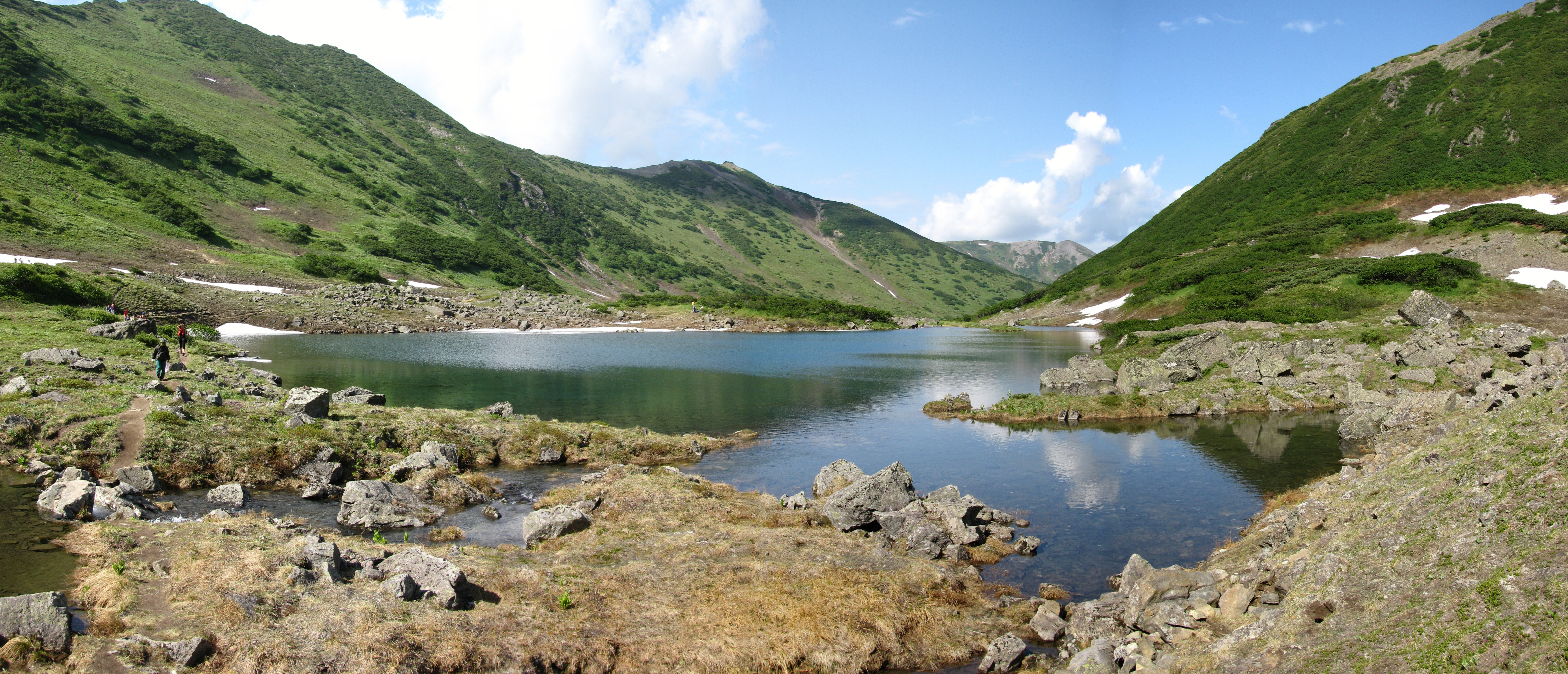 Голубые озера. Камчатка